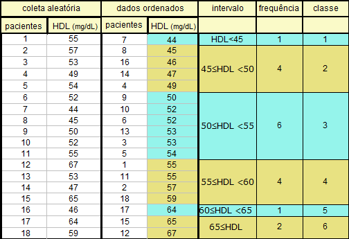 Histograma : coleta de HDL de 18 pacientes ordenadados para construção de histograma com o software Origin